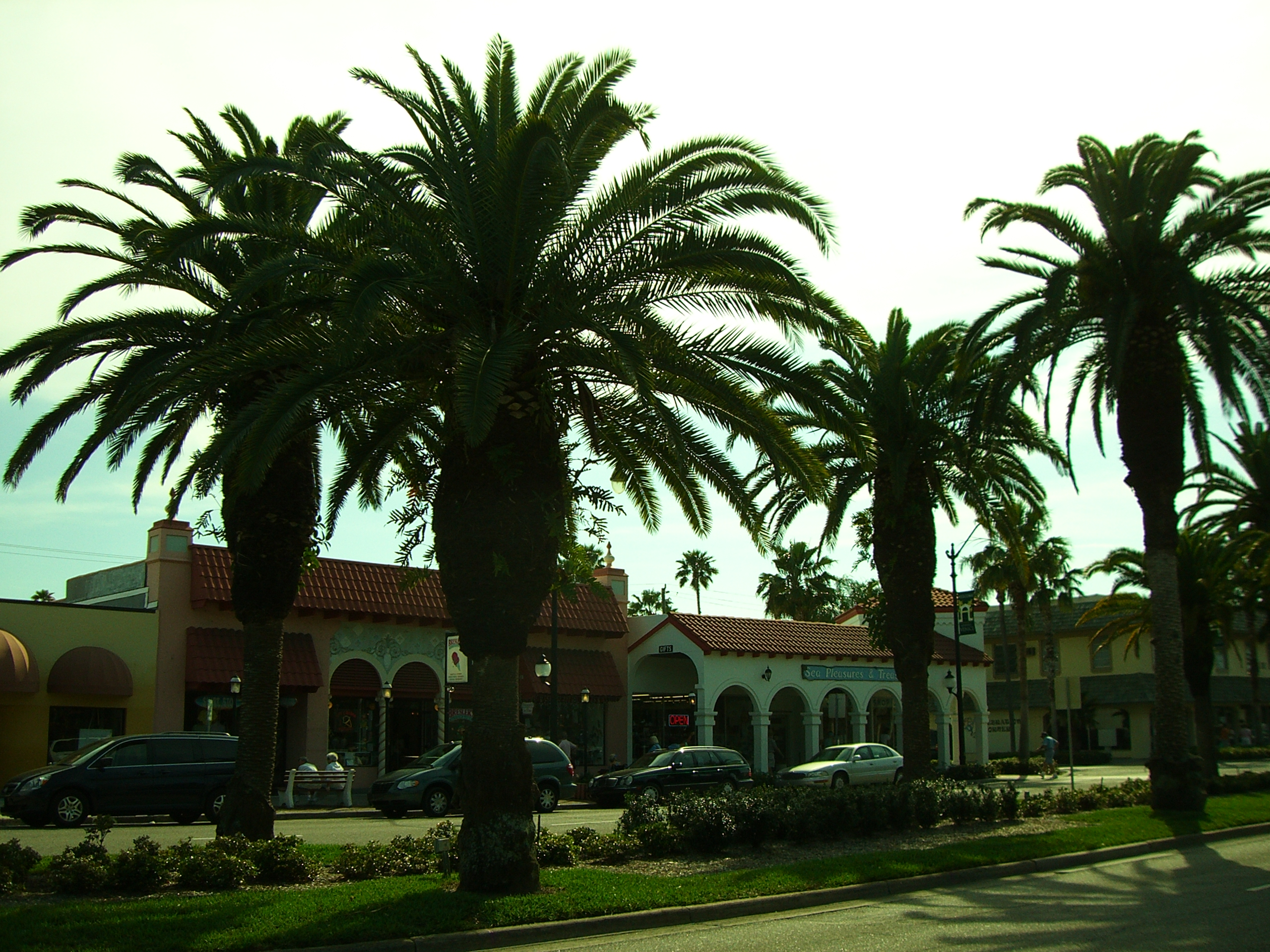 Venice, Florida, USA